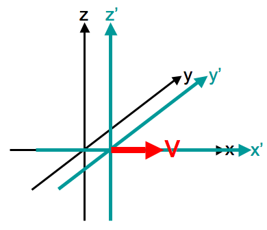 norma konfiguro de lorenca transformo